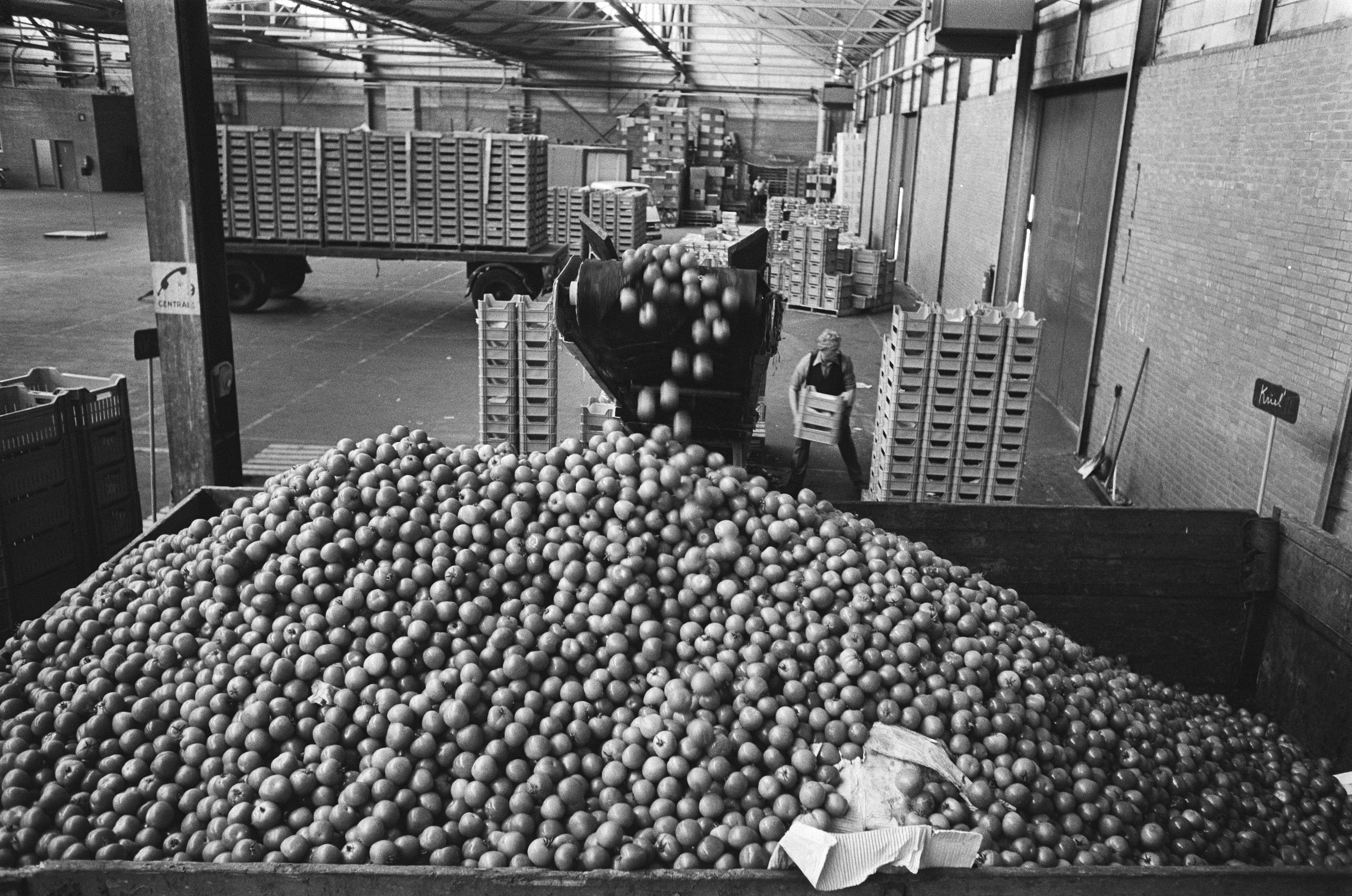 Collectie / Archief : Fotocollectie Anefo Reportage / Serie : [ onbekend ] Beschrijving : Tomaten en komkommers worden doorgedraaid in Westland; tomaten worden uit kistjes gestort Datum : 8 augustus 1977 Fotograaf : Verhoeff, Bert / Anefo Auteursrechthebbende : Nationaal Archief Materiaalsoort : Negatief (zwart/wit) Nummer archiefinventaris : bekijk toegang 2.24.01.05 Bestanddeelnummer : 929-2981